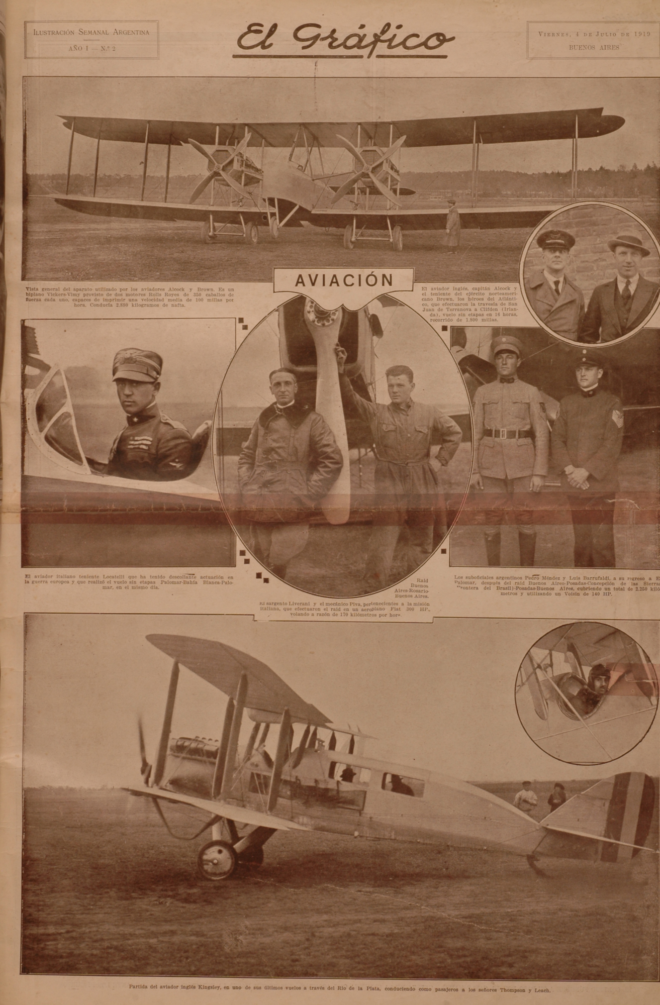 El Grafico del 04 de Julio de 1919. Edicion 2